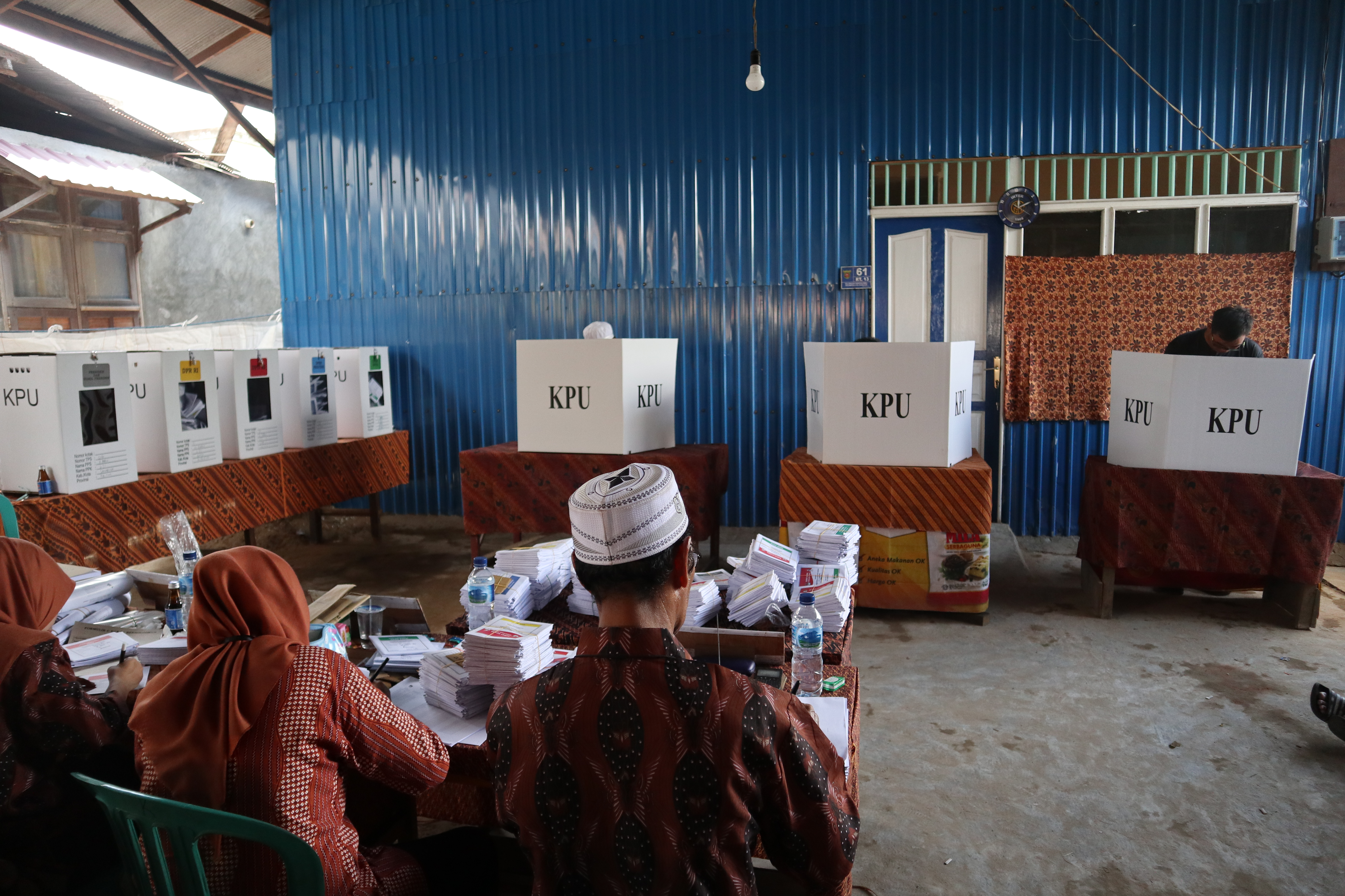 Suasana di tempat pemungutan suara (TPS) dalam Pemilihan umum Indonesia 17 April 2019. (Lokasi: TPS 16 Harapan Baru, Kec. Loa Janan Ilir, Samarinda, Kalimantan Timur)